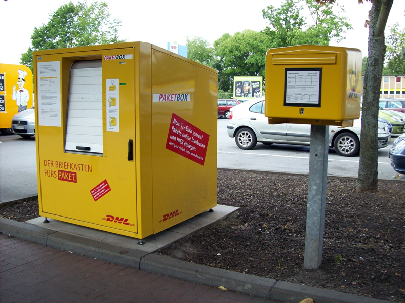 Paketbox